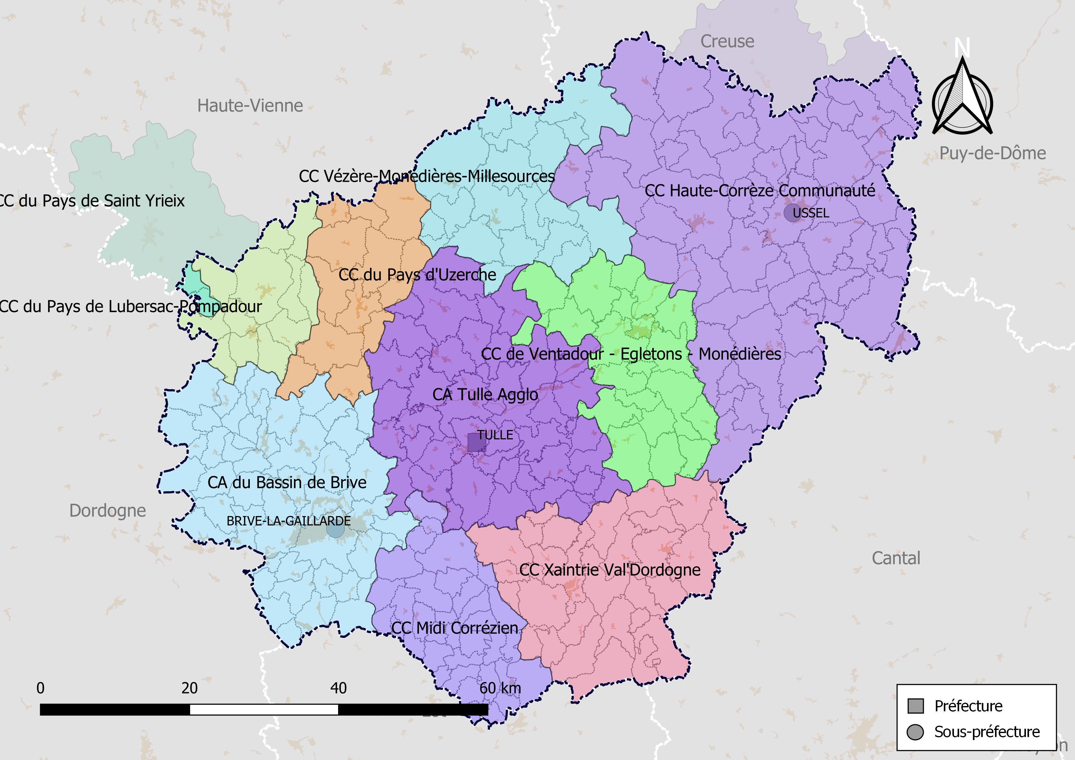 Carte des intercommunalités du département de la Corrèze, France. Composition au 1er janvier 2019